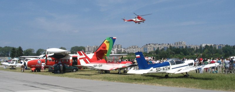 Pokaz możliwości śmigłowca ratowniczego. Małopolski Piknik Lotniczy w 2006 raku.